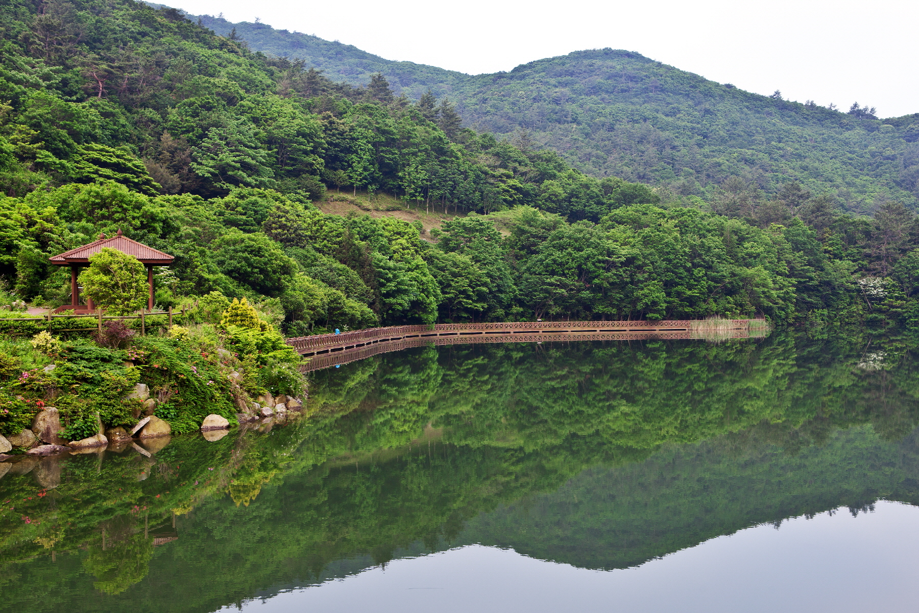 완도수목원의 수변데크